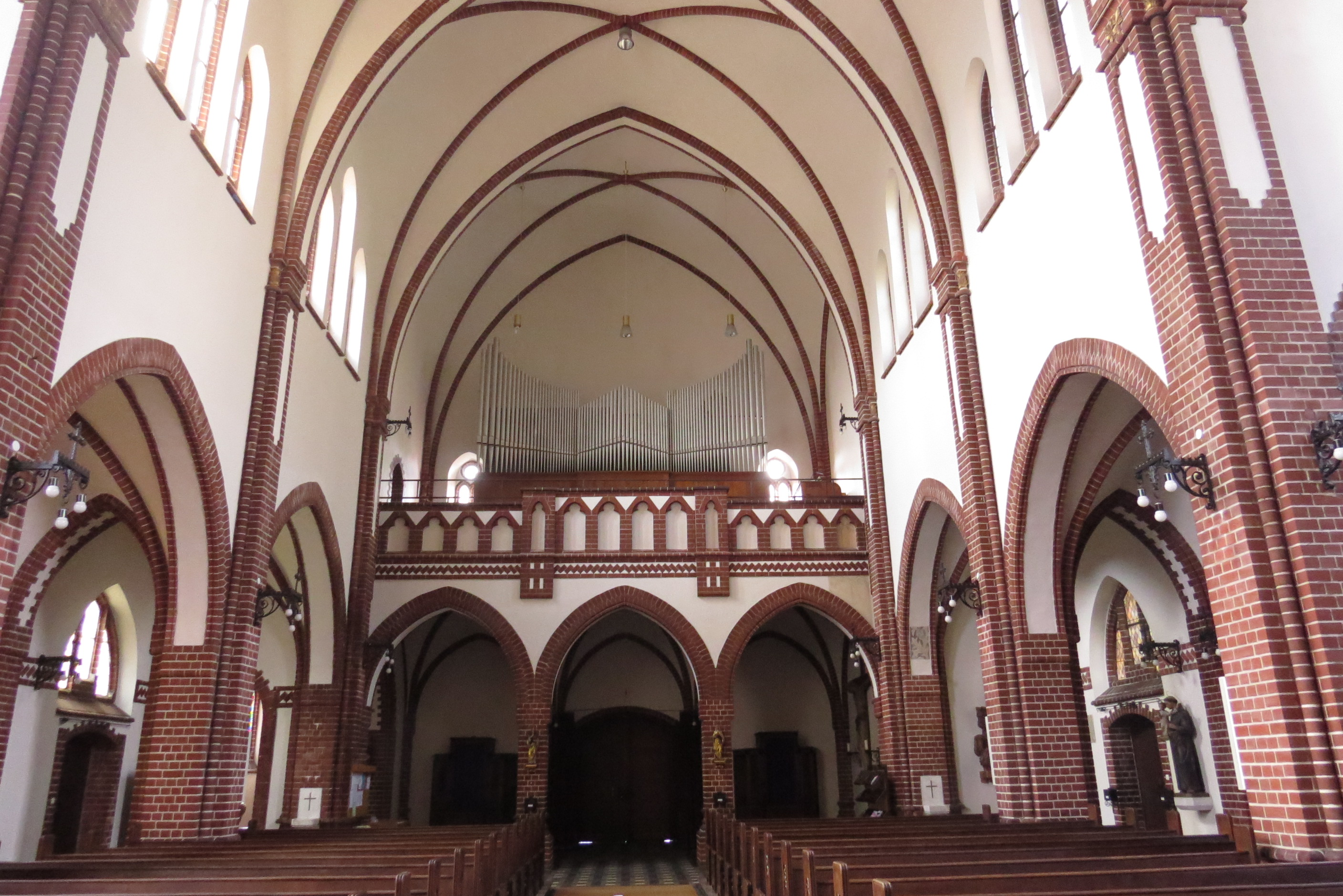 Kirche St. Georg, Berlin-Pankow, Kircheninnenraum, Blickrichtung Orgel